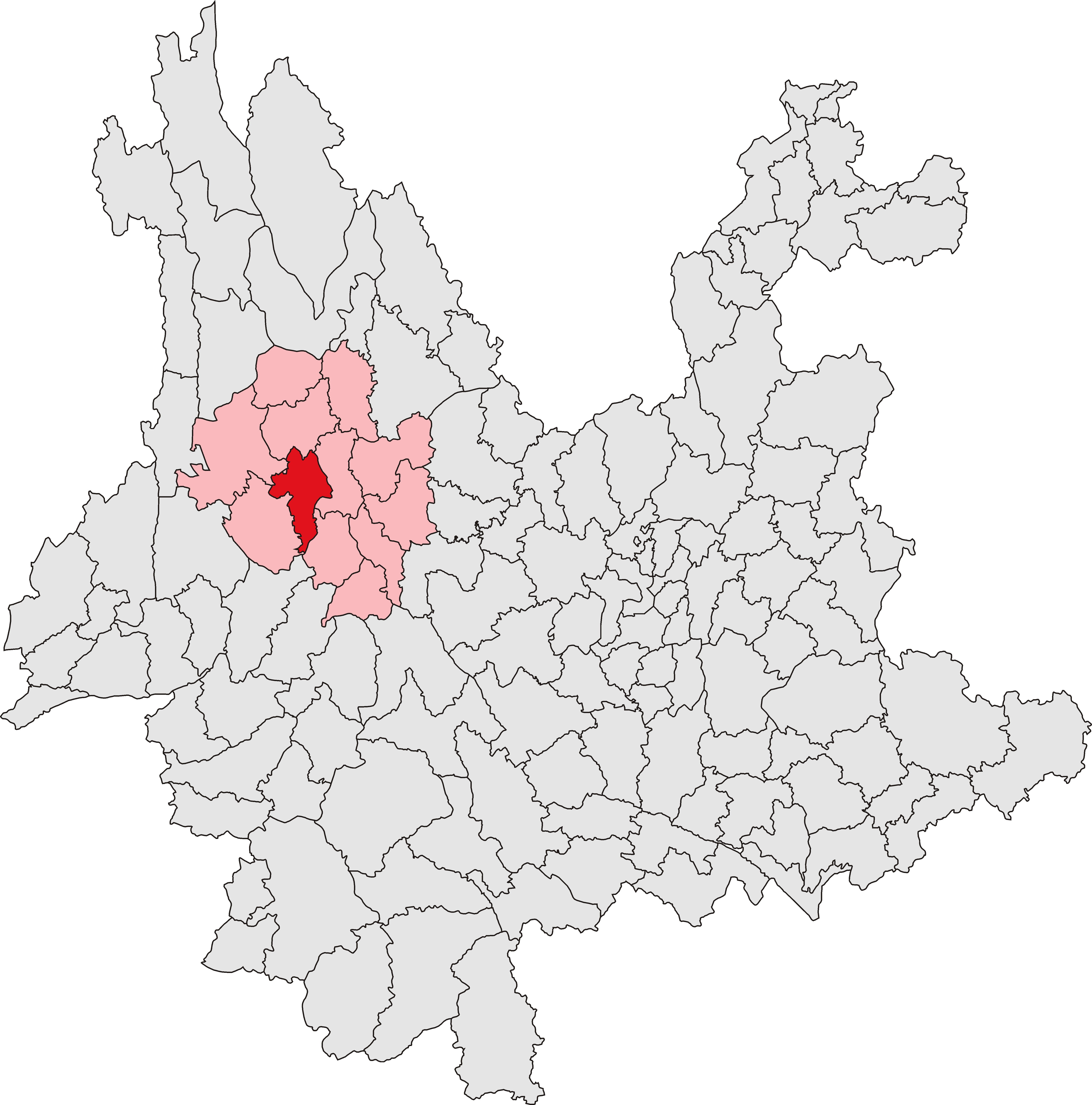 中文（中国大陆）: 漾濞彝族自治县位置图